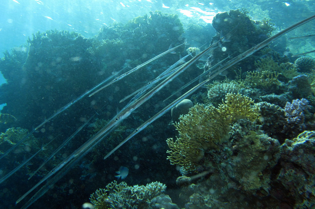 Fistularia commersonii, en el Mar Rojo